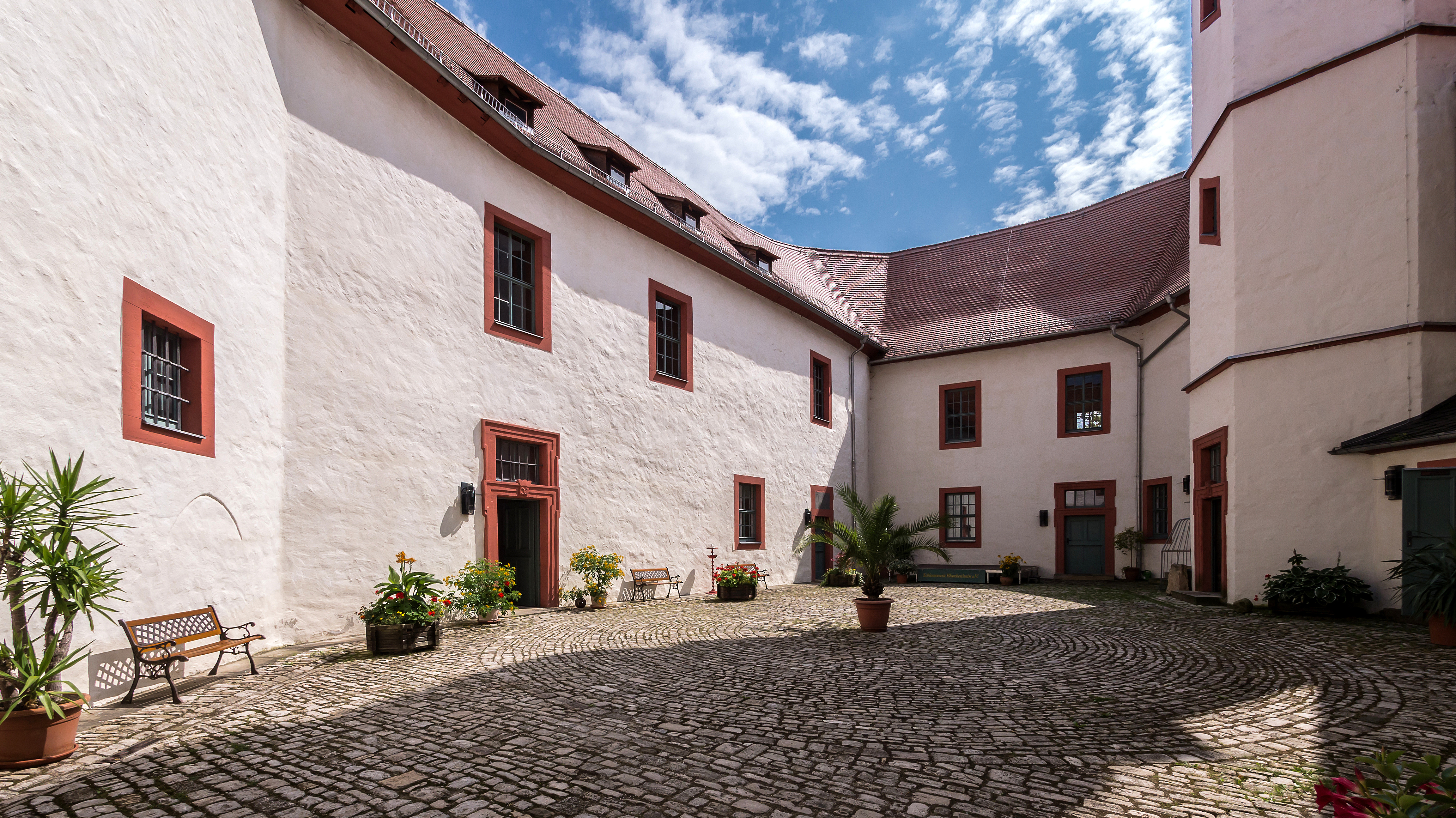 Blankenhain Schloss Innenhof VI